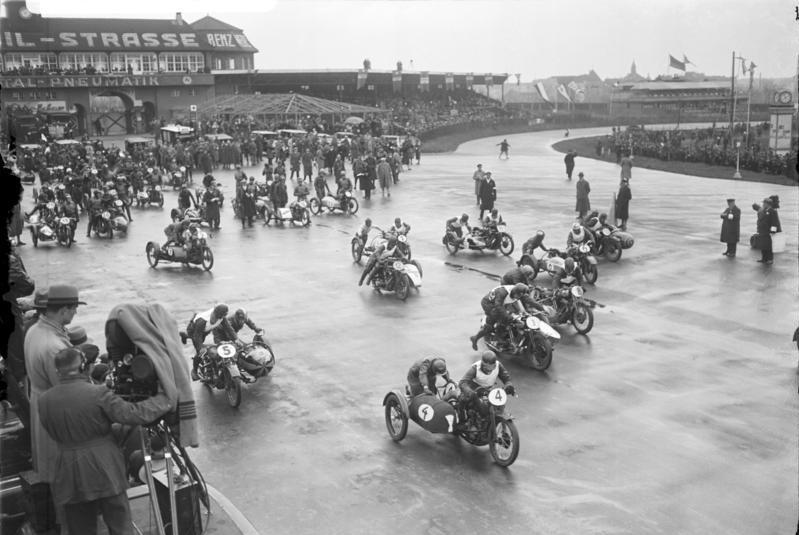 Berlin - Avus Das große internationale Motorradrennen um den Preis der Stadt Berlin auf der Avus in Berlin! Massenstart der Motorräder um den großen Preis der Stadt Berlin auf der Avus.